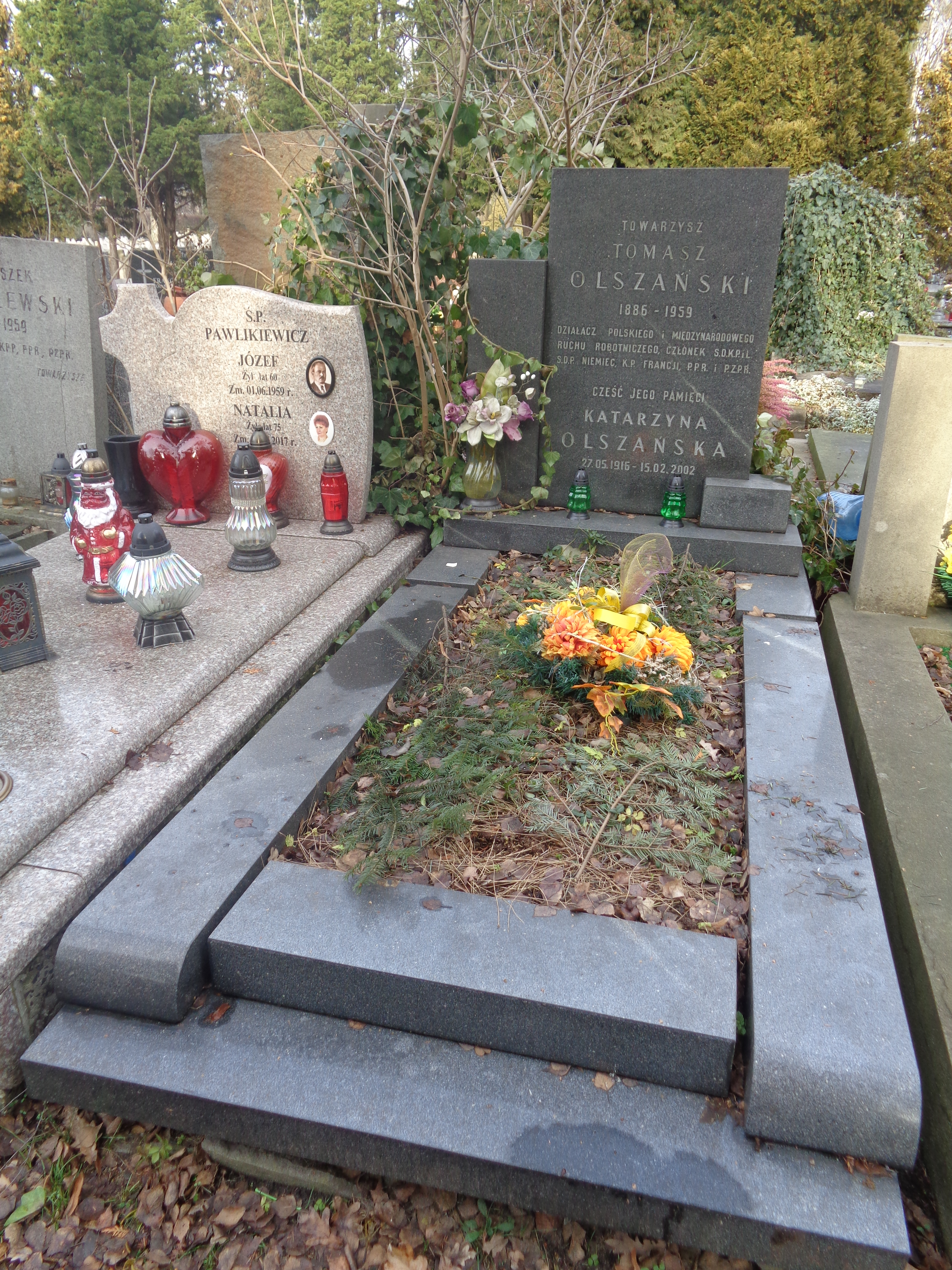 Grób Tomasza Olszańskiego na Cmentarzu Wojskowym na Powązkach Grave of Q3525453 Depicted place: Powązki Military Cemetery